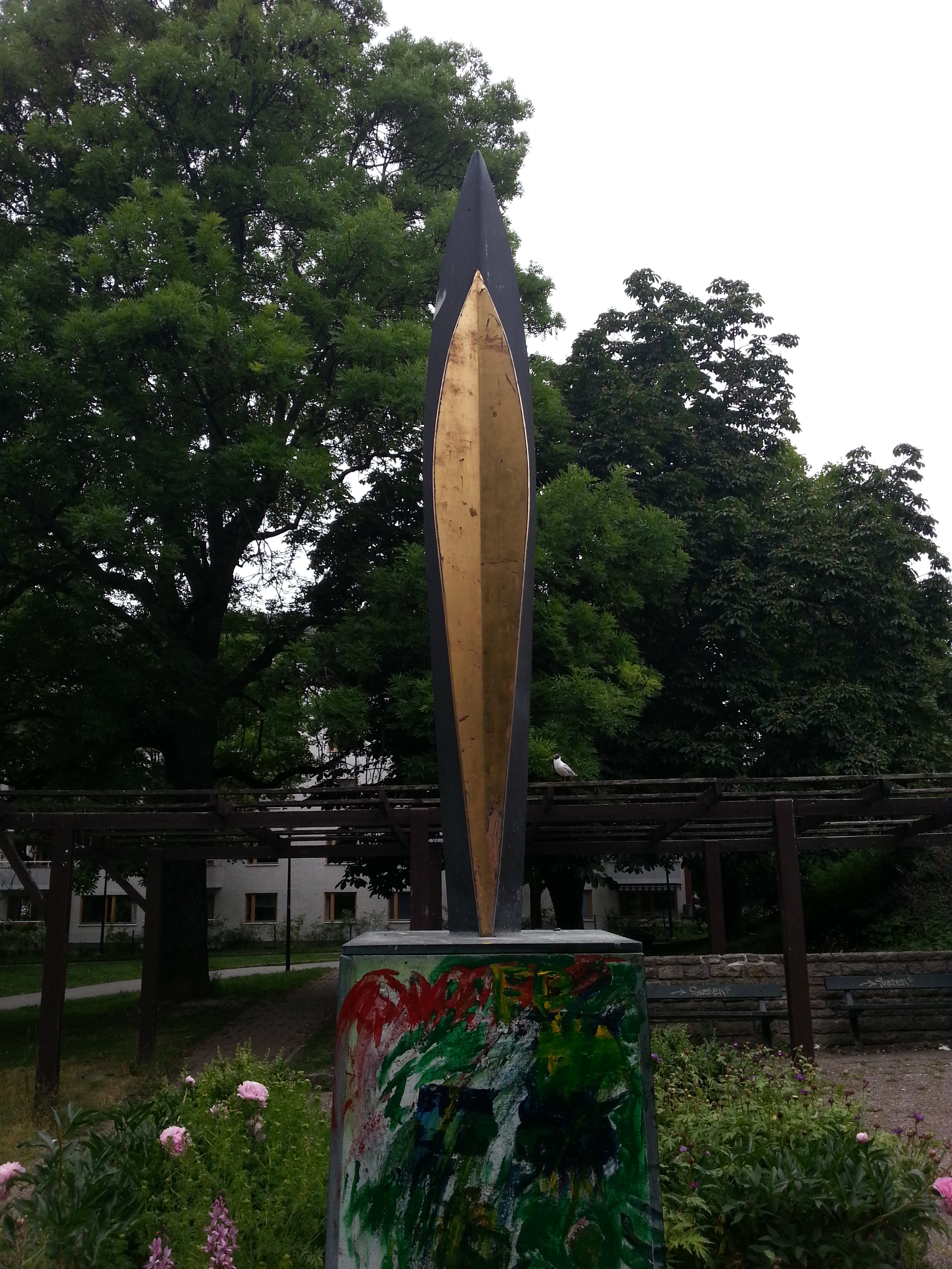 Lågan (1973) - Leo Janis-Brieditis. I Tuvanparken, Sundbyberg.